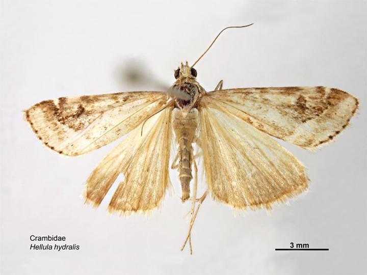 Hellula hydralis dorsal view